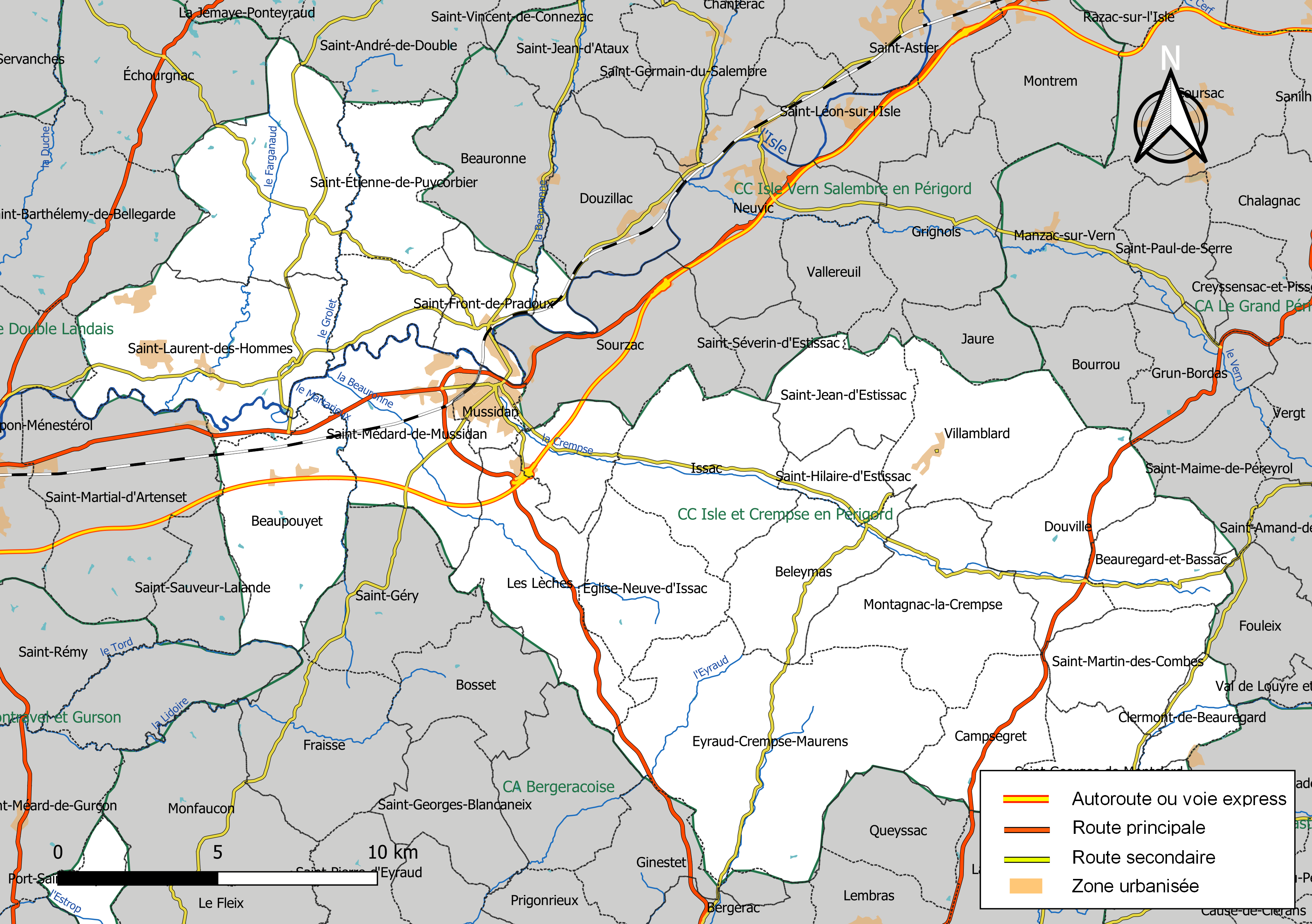 Carte géographique de la Communauté de communes Isle et Crempse en Périgord, département de la Dordogne, France. Composition au 1er janvier 2019.